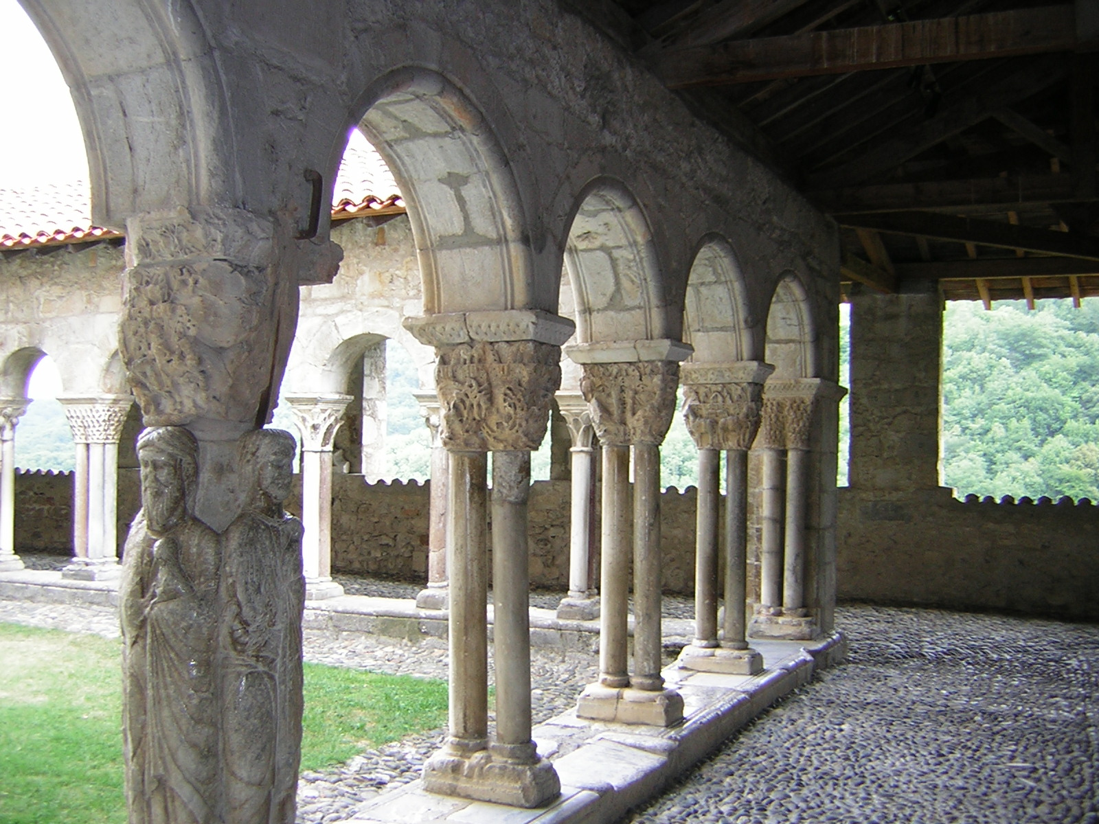 St-Bertrand-de-Comminges: claustro de la catedral de Santa María